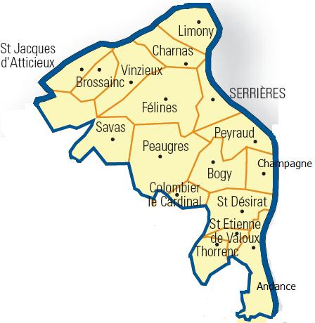 Carte détaillée des communes du canton (Ardèche)